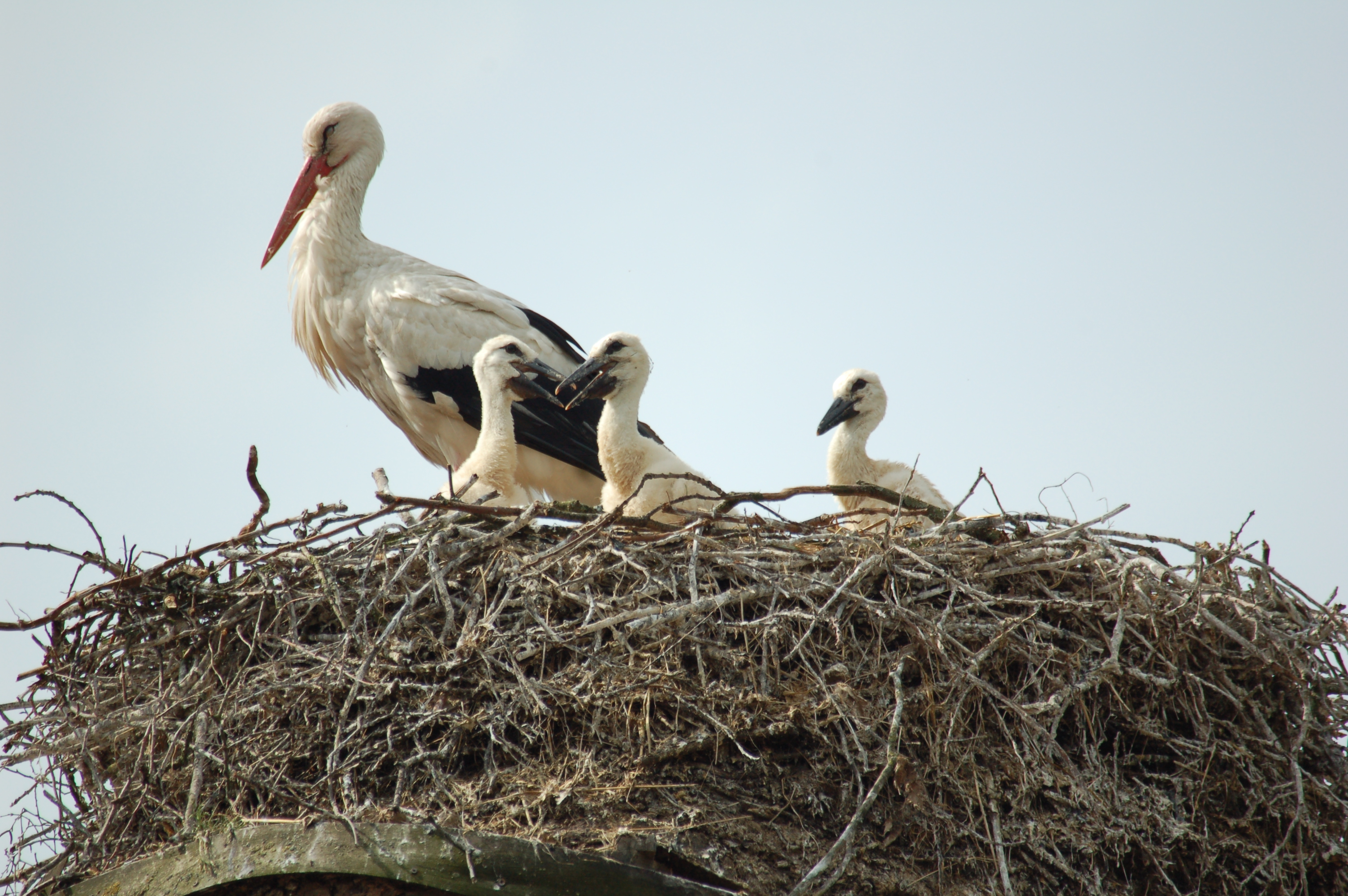 Storchennest im Tierpark Nordhorn